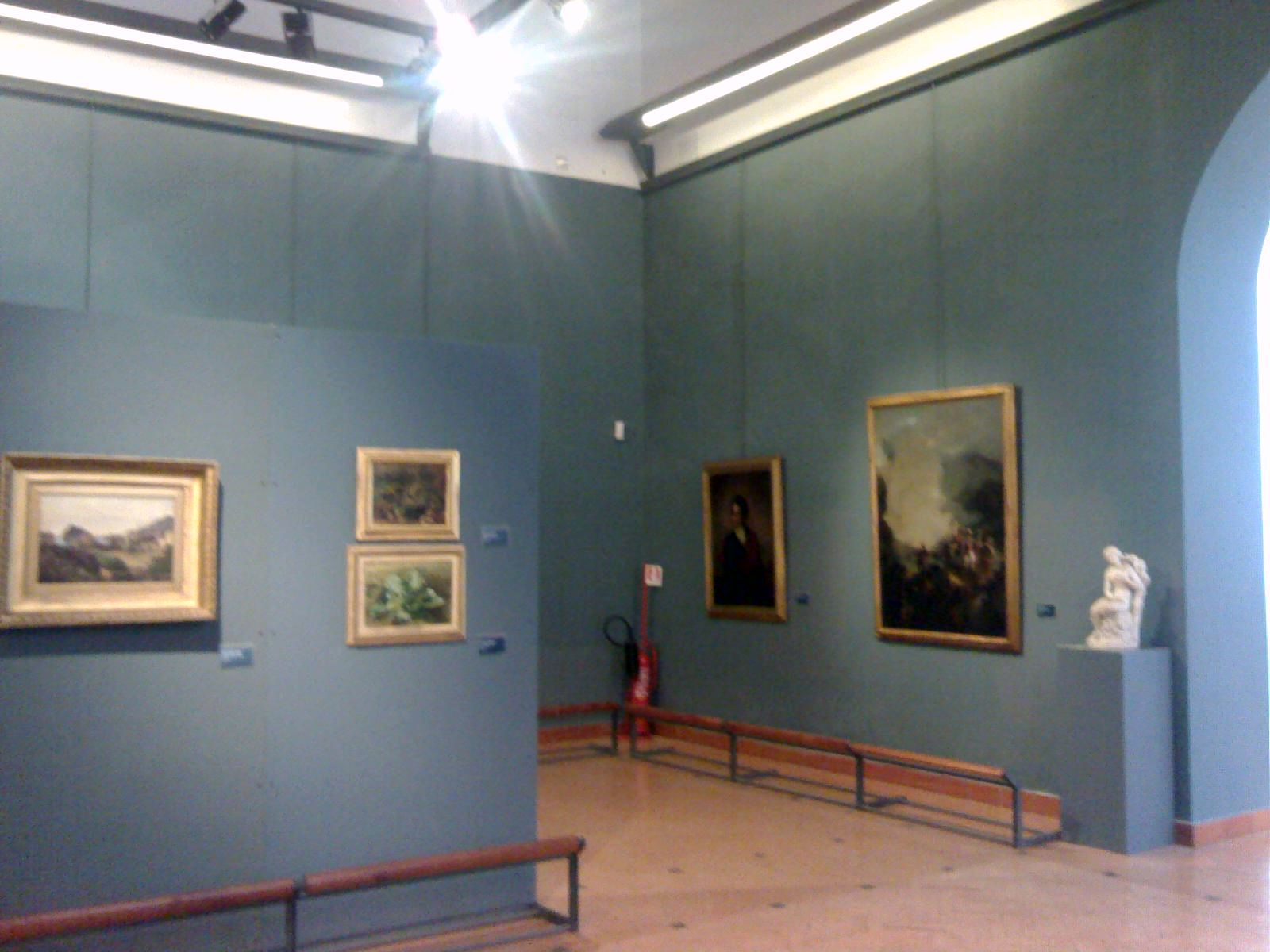 Accademia di Belle Arti di Napoli - La galleria dell'accademia A destra si vede la scultura marmorea Eva di Tito Angelini